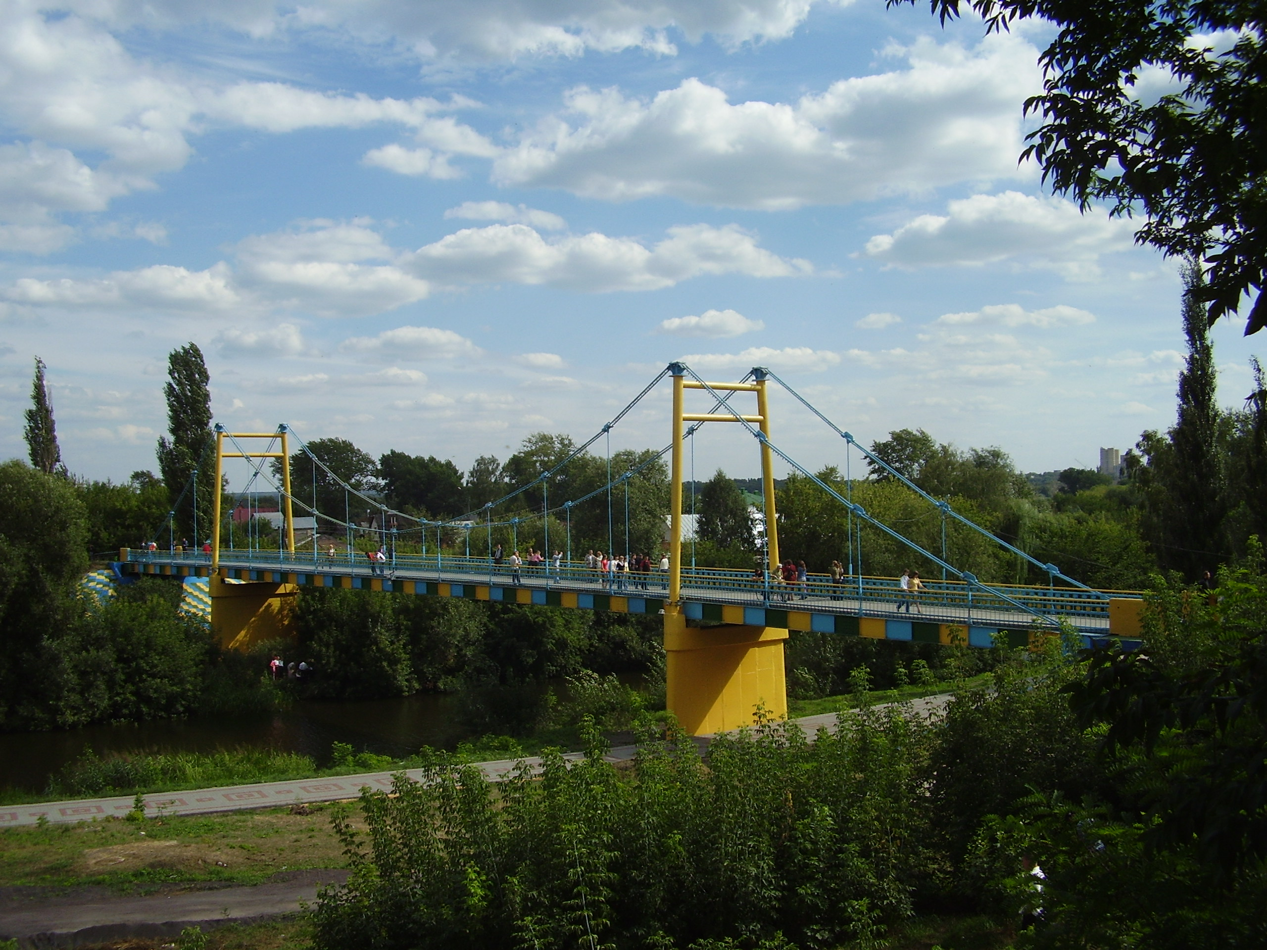 Тамбов,пешеходный мост через Цну